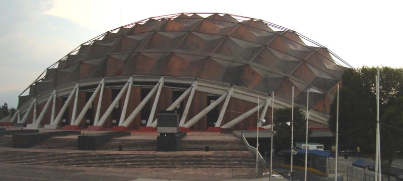 "ARGUMENTOS" Lugar para Conciertos, eventos, espectáculos y deportes en México